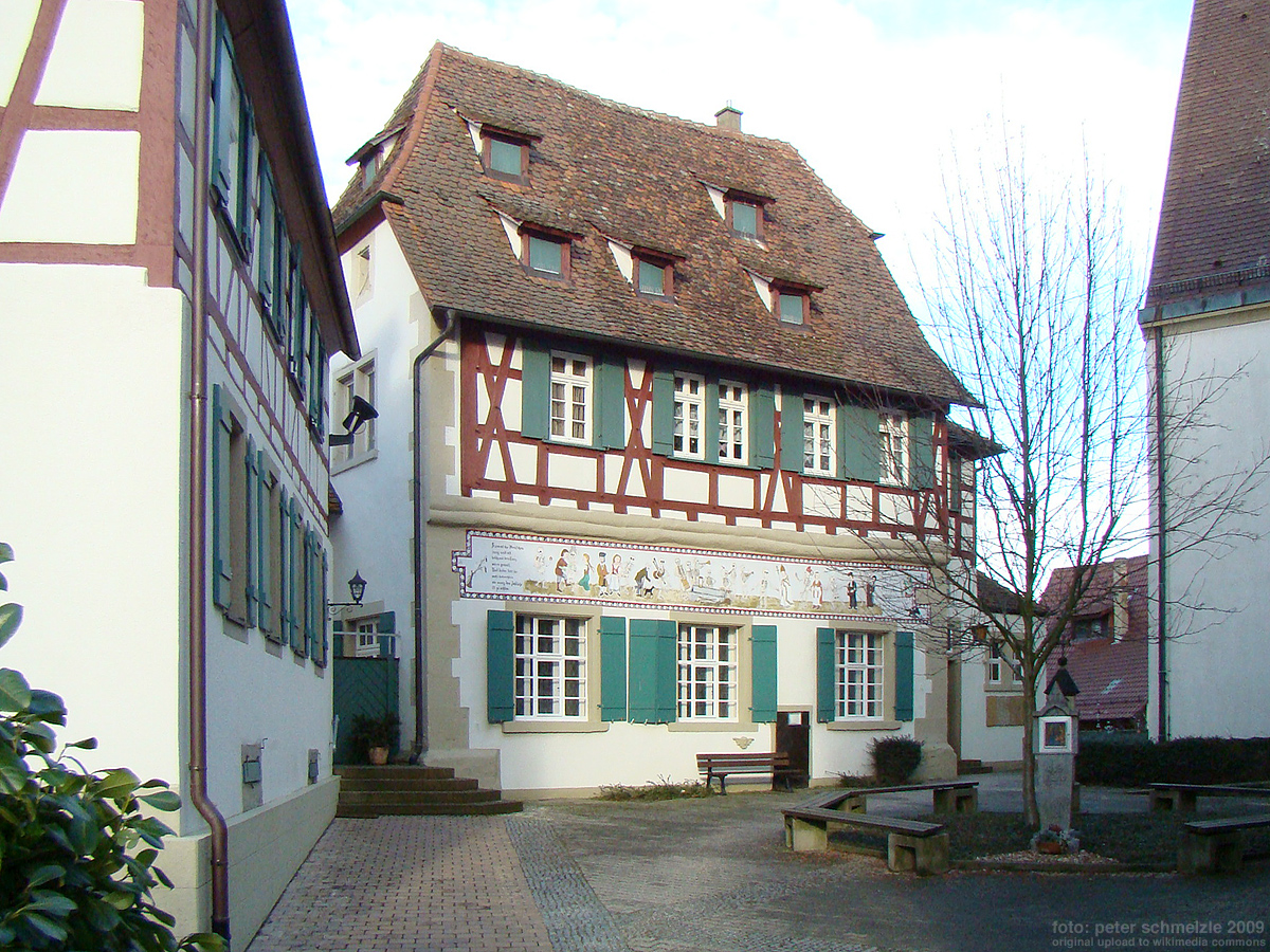 Katharinenkapelle in Eppingen